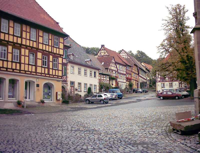 Altstadt von Königsberg in Franken. Blick zum Salzmarkt. Eigene Aufnahme, 2003